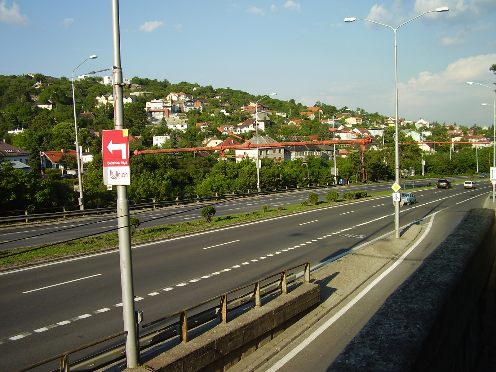 Pražská, Bratislava